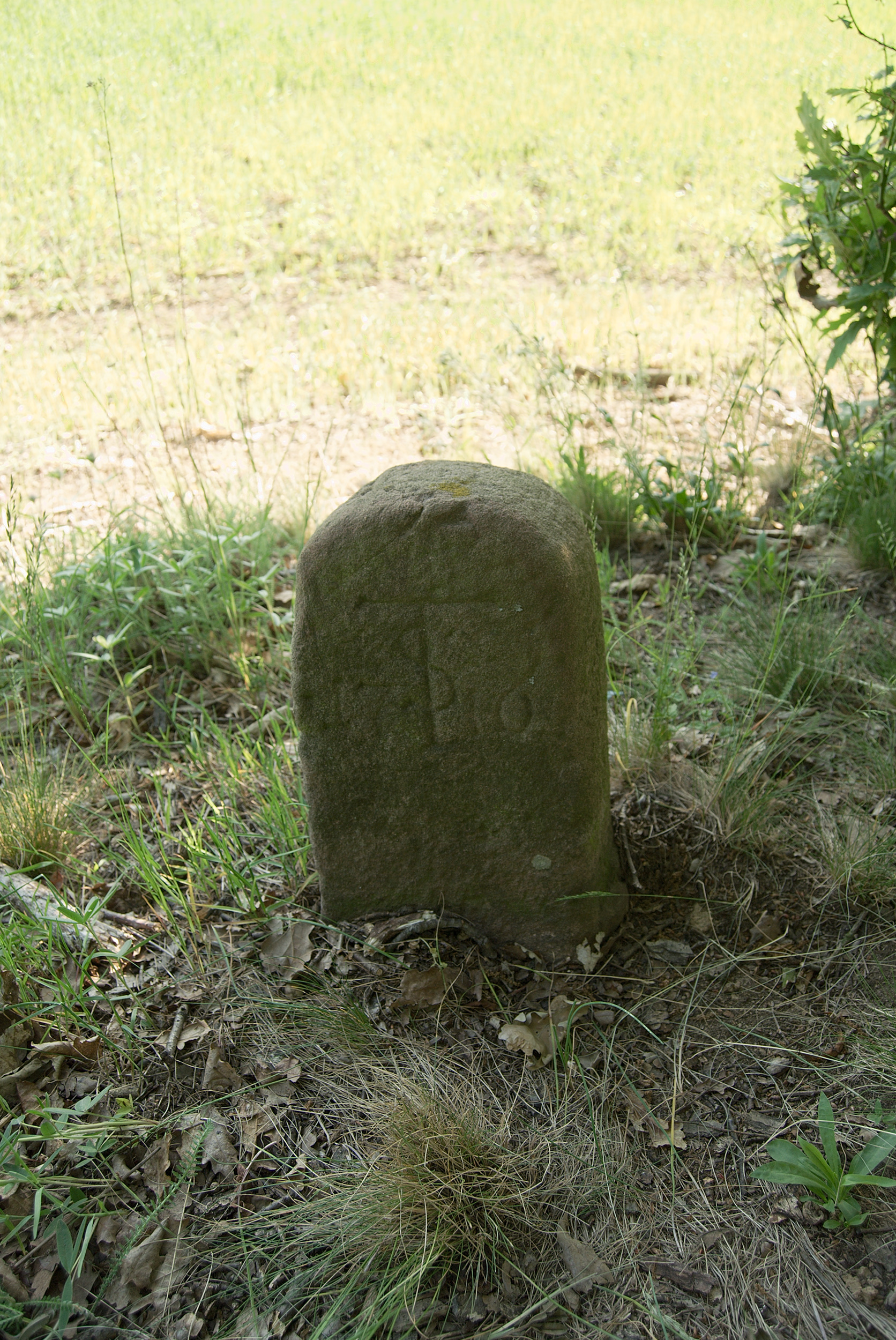 Brno-Žebětín - hraniční kámen z roku 1716 na jižní hranici PP Pekárna vymezující zde hranici části žebětínského katastru, patřící k panství kláštera Sv. Tomáše v Brně